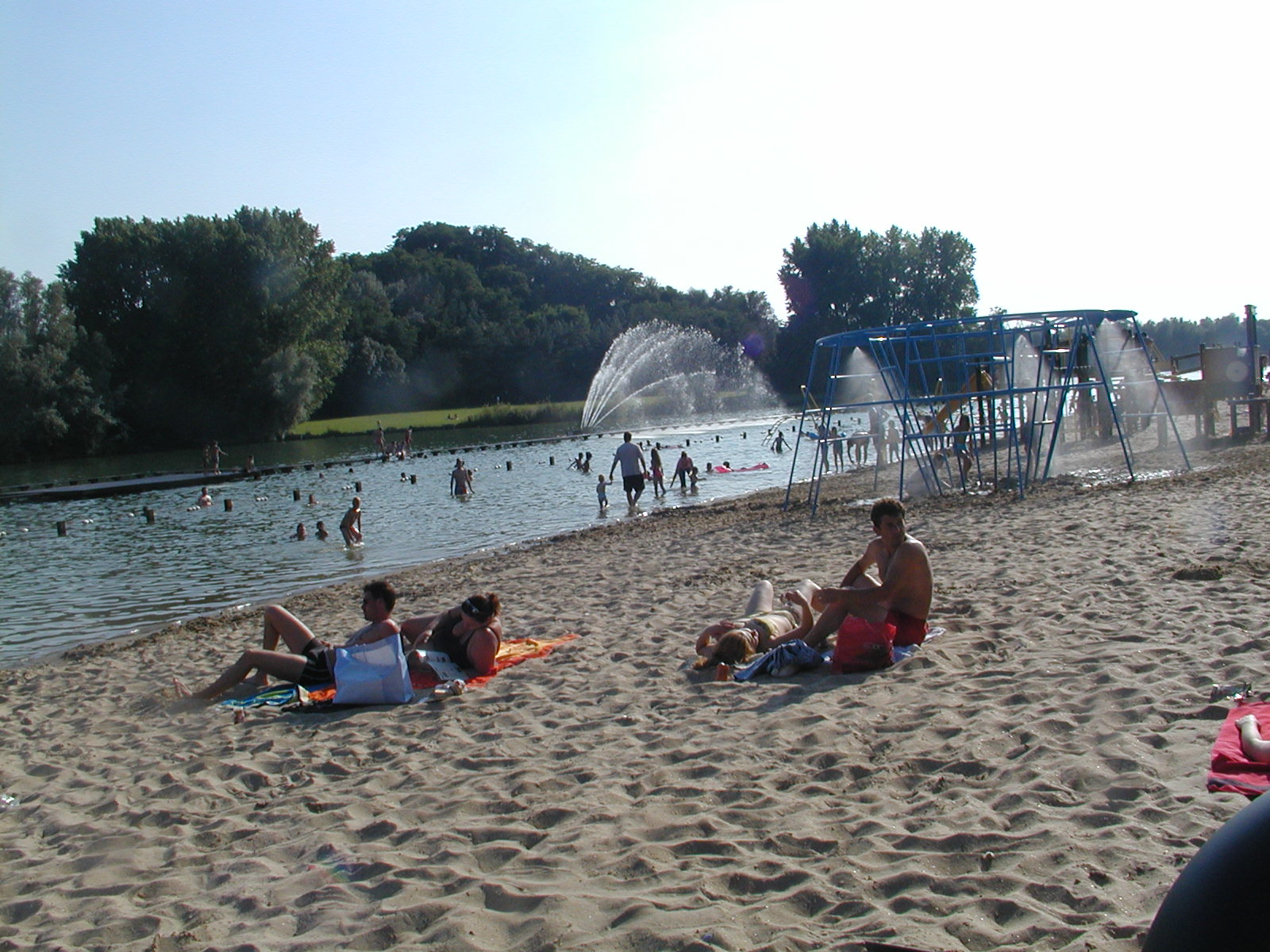 Blaarmeersen en Gent - la strando aŭtoro: Yves NEVELSTEEN dato: julio 2005